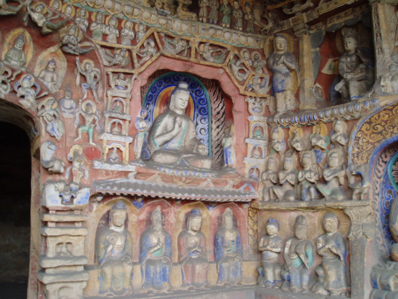 Buddha de Datong Dominique Kirsner 2004